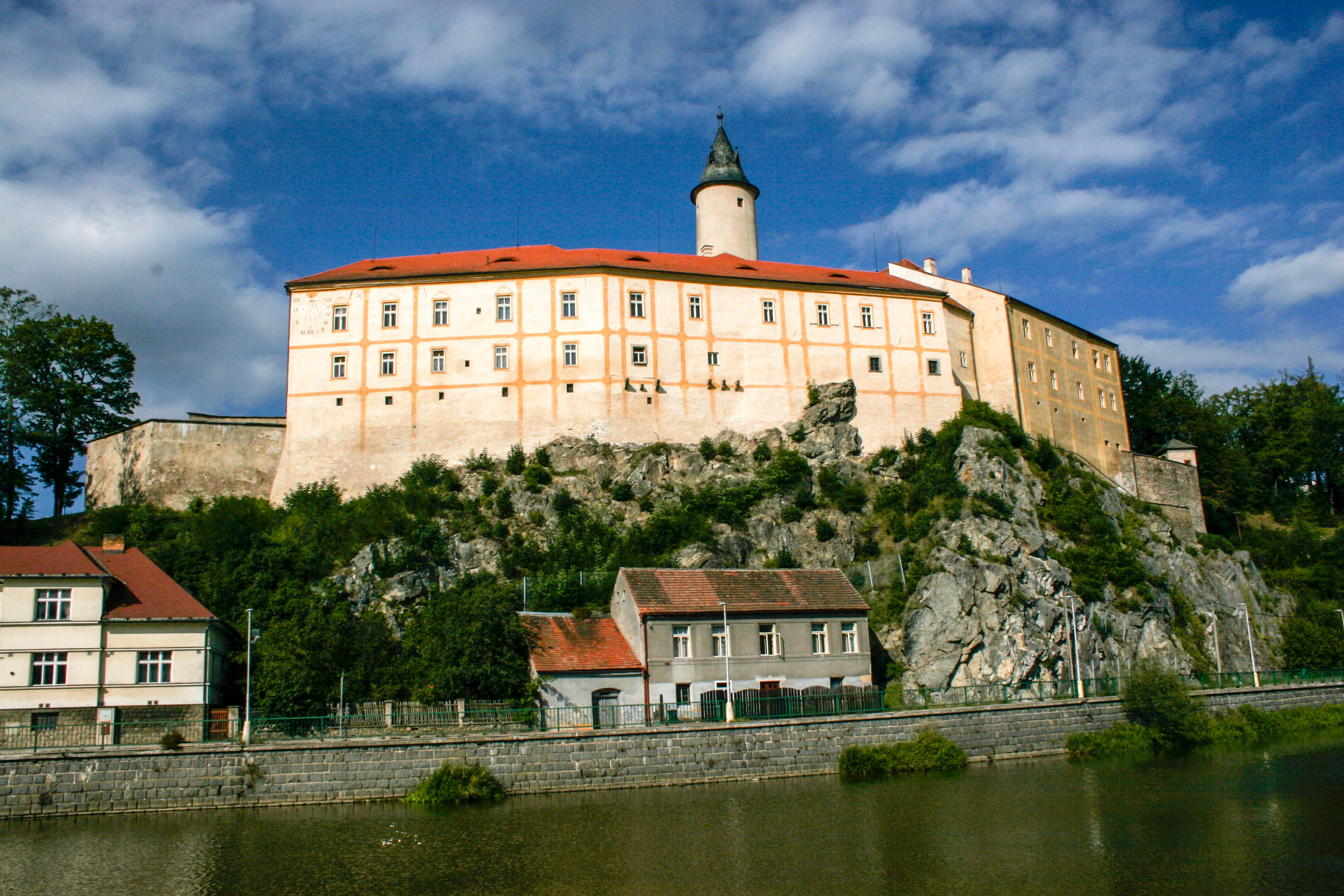 Hrad v Ledči nad Sázavou. Česká republika.